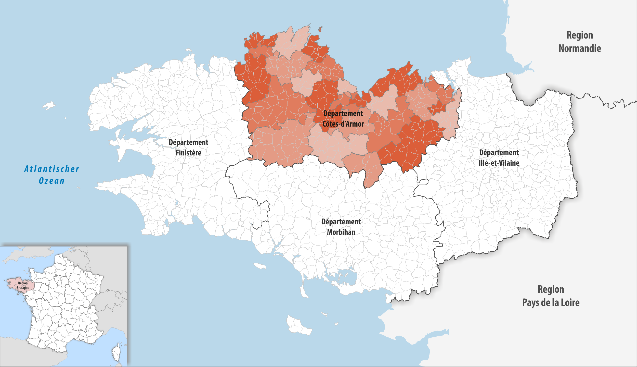 Lage des Departements Côtes-d’Armor